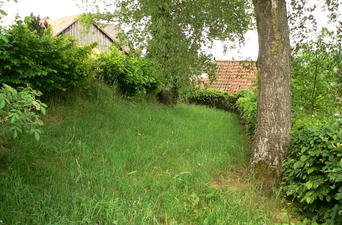 Jüdischer Friedhof Hämelschenburg, Innenraum